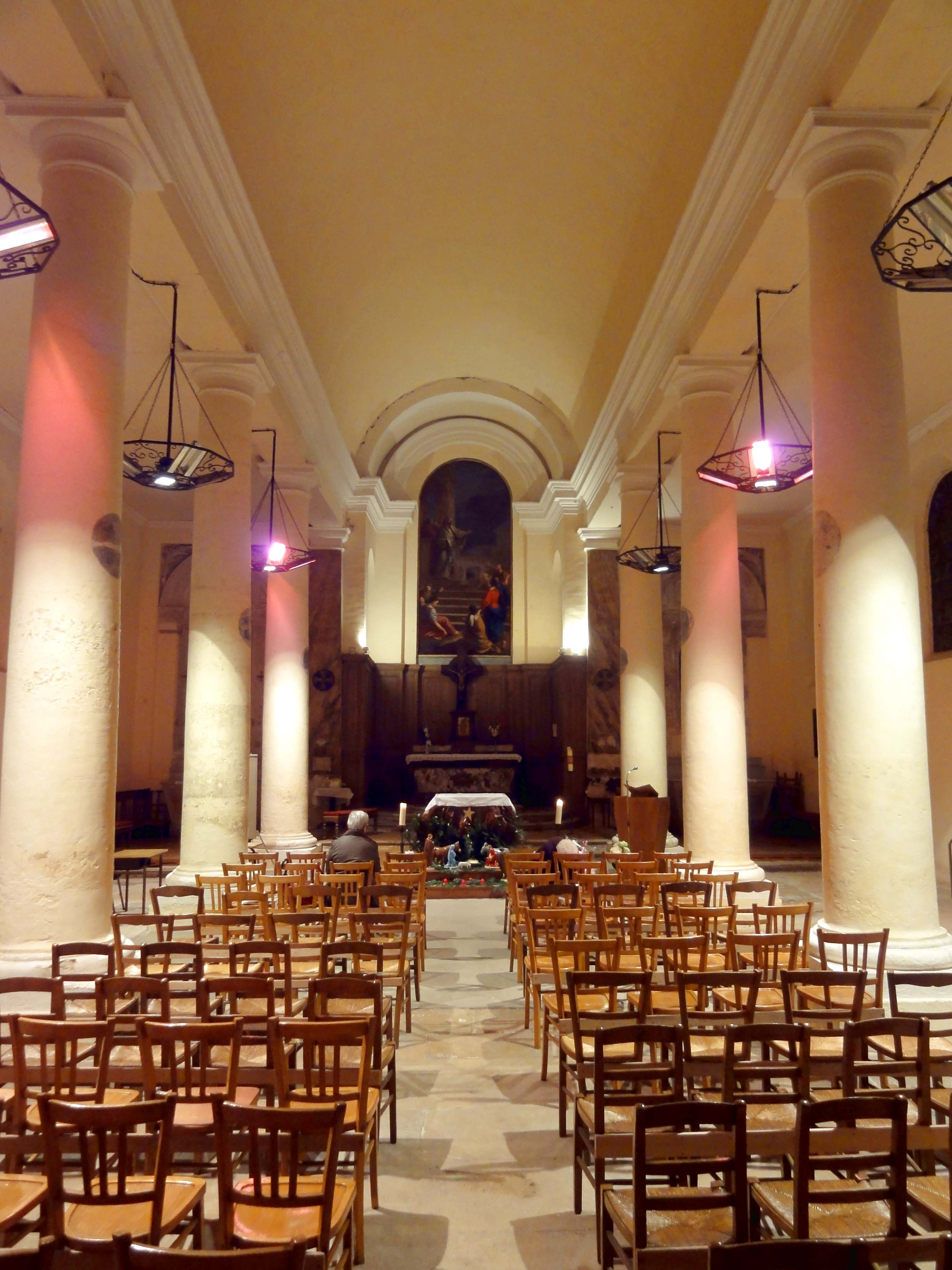 Intérieur de l'église - voir titre.